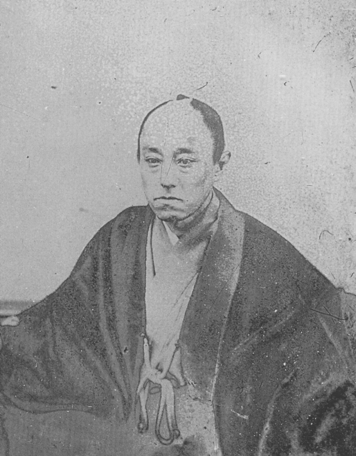 山内豊信または山内容堂。Yamanouchi Toyoshige A.K.A Yamanouti Yōdō.東京の浅草にあった内田九一写真館にて撮影された写真。湿板写真。